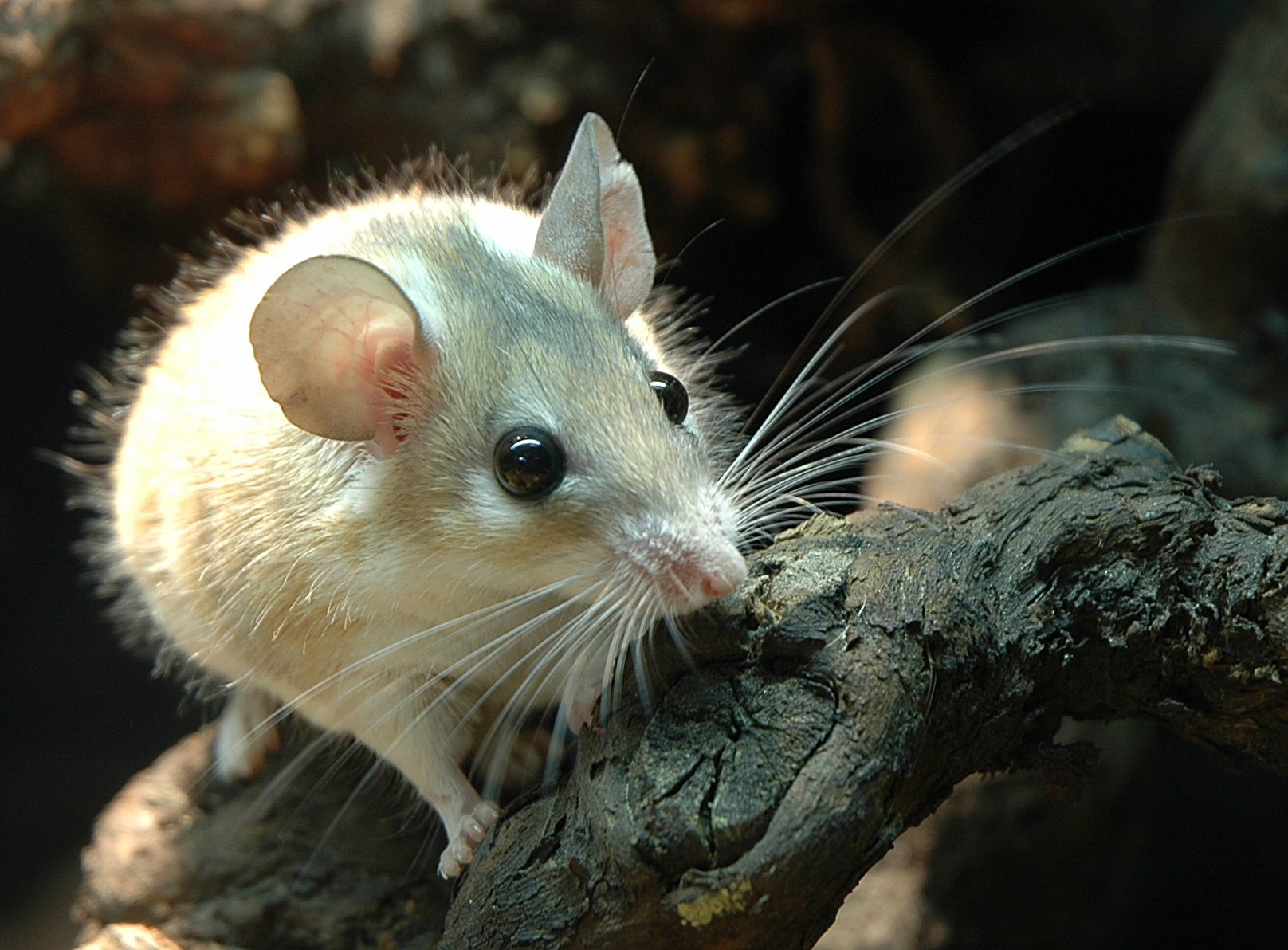 Sinai Stachelmaus (Acomys cahirinus dimidiatus = Acomys dimidiatus)